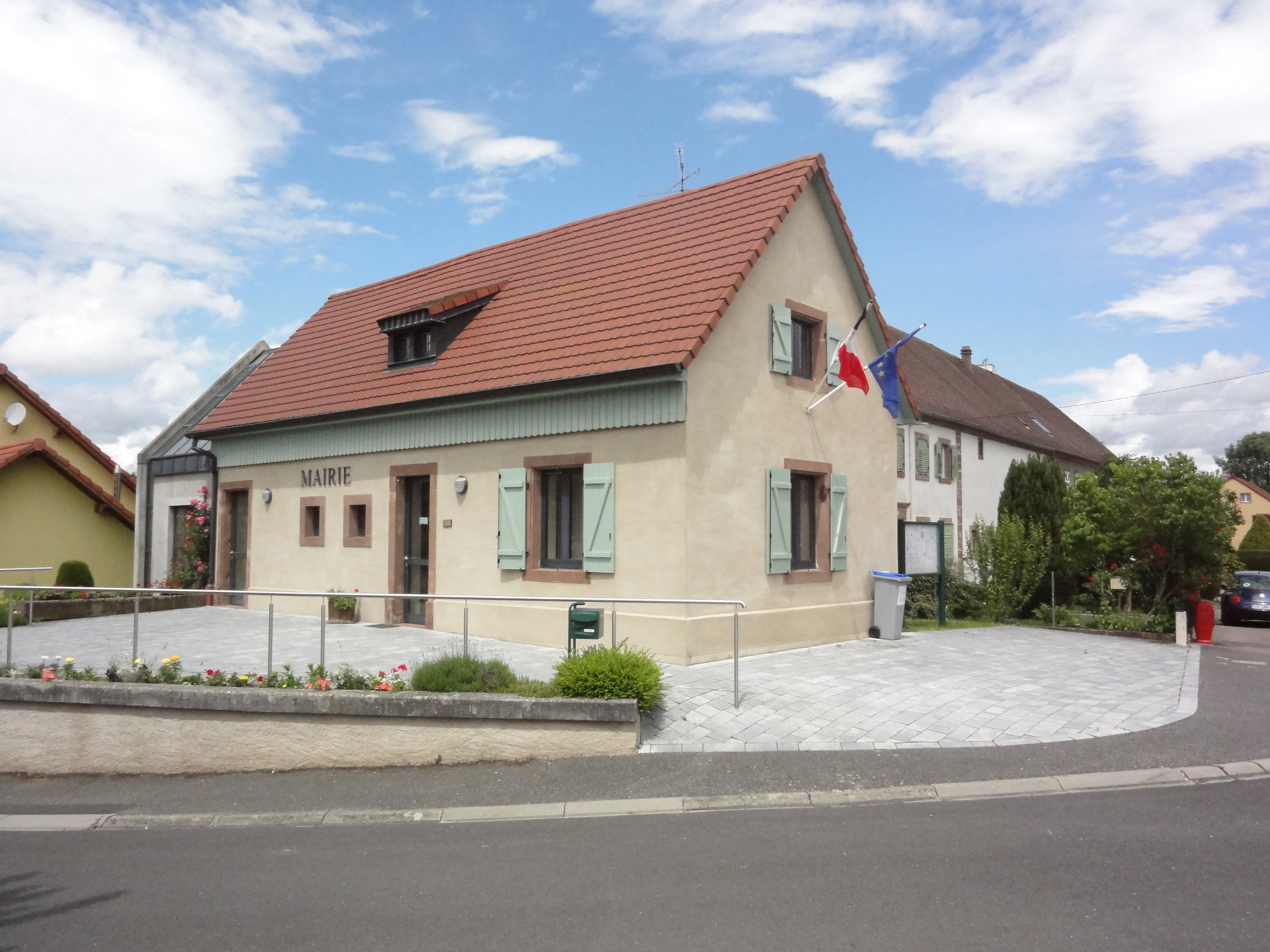 Schneckenbusch (Moselle) mairie